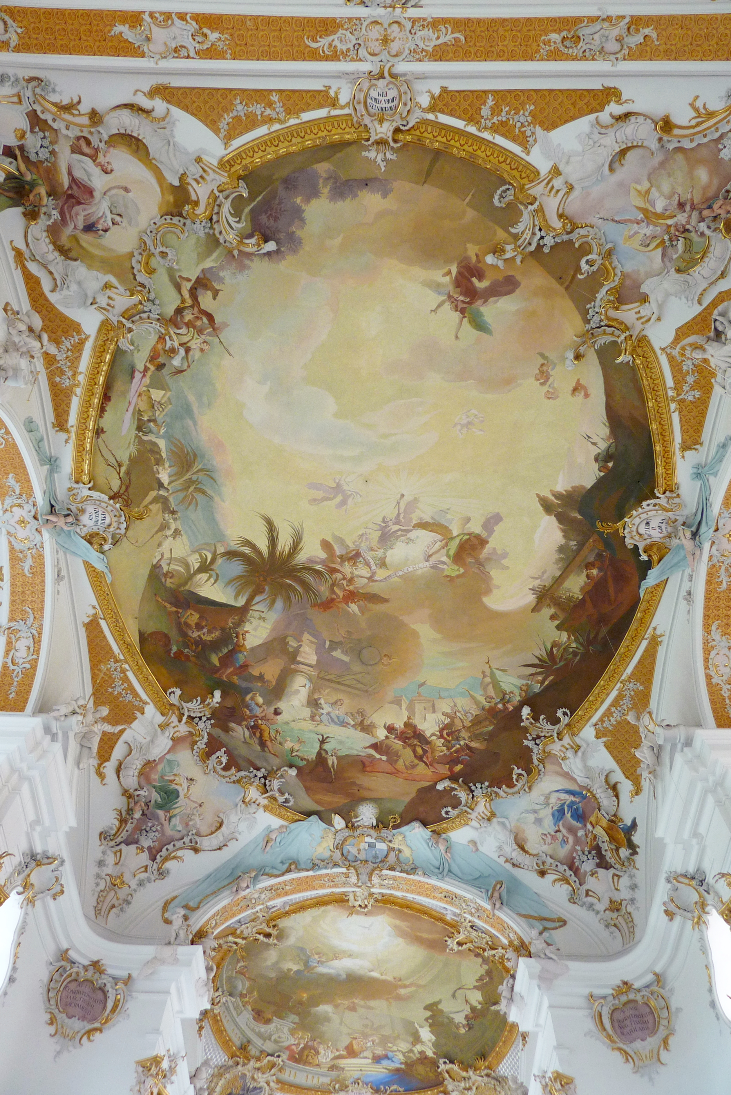 Katholische Pfarrkirche, ehemalige Prämonstratenser-Klosterkirche Mariä Himmelfahrt in Roggenburg im Landkreis Landkreis Neu-Ulm (Bayern), Deckenfresko von Waldemar Kolmsperger, von 1900/01, Darstellung: Geburt Jesu